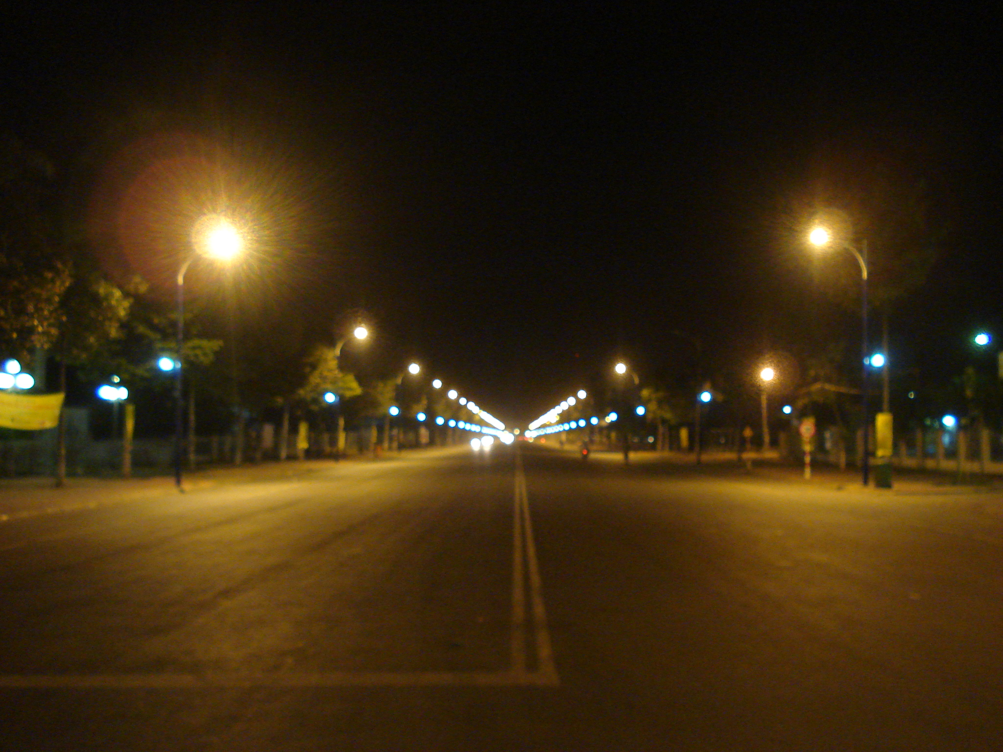 une rue de Cao Lanh de nuit